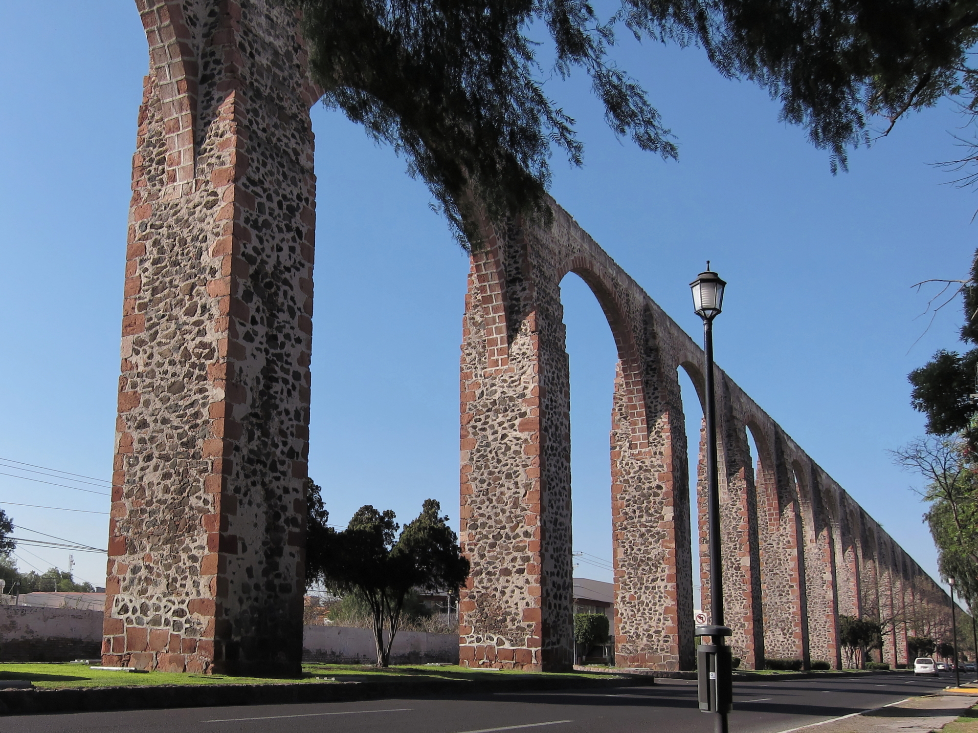 Acueducto de Santiago de Queretaro, Mexico